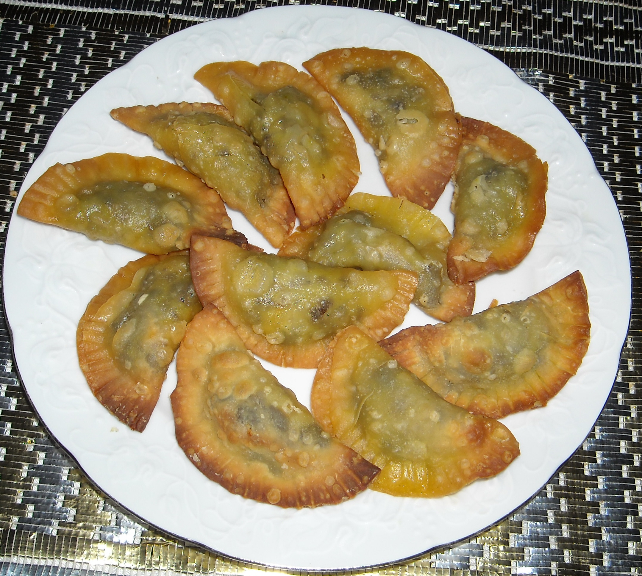 Rissoles tunisiennes (brik edennouni)